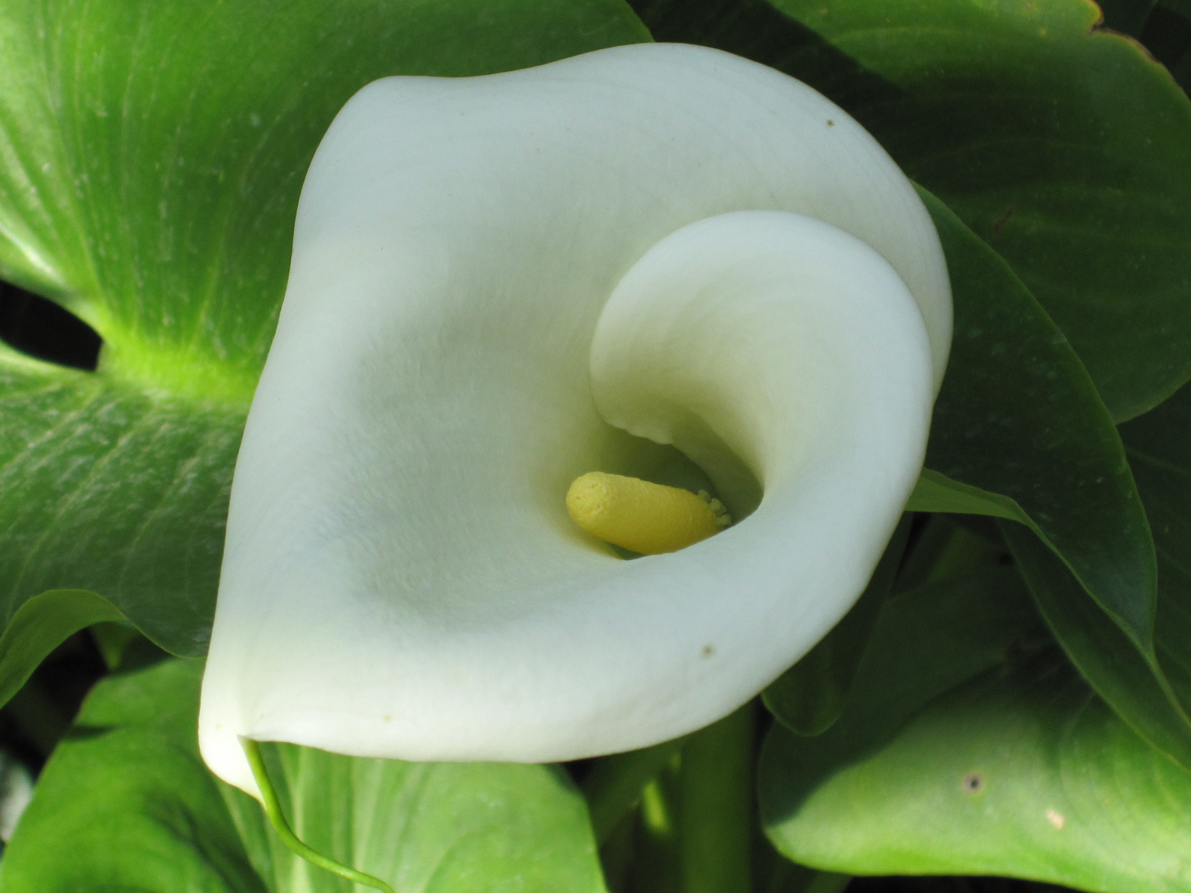 Zantedeschia/Calla